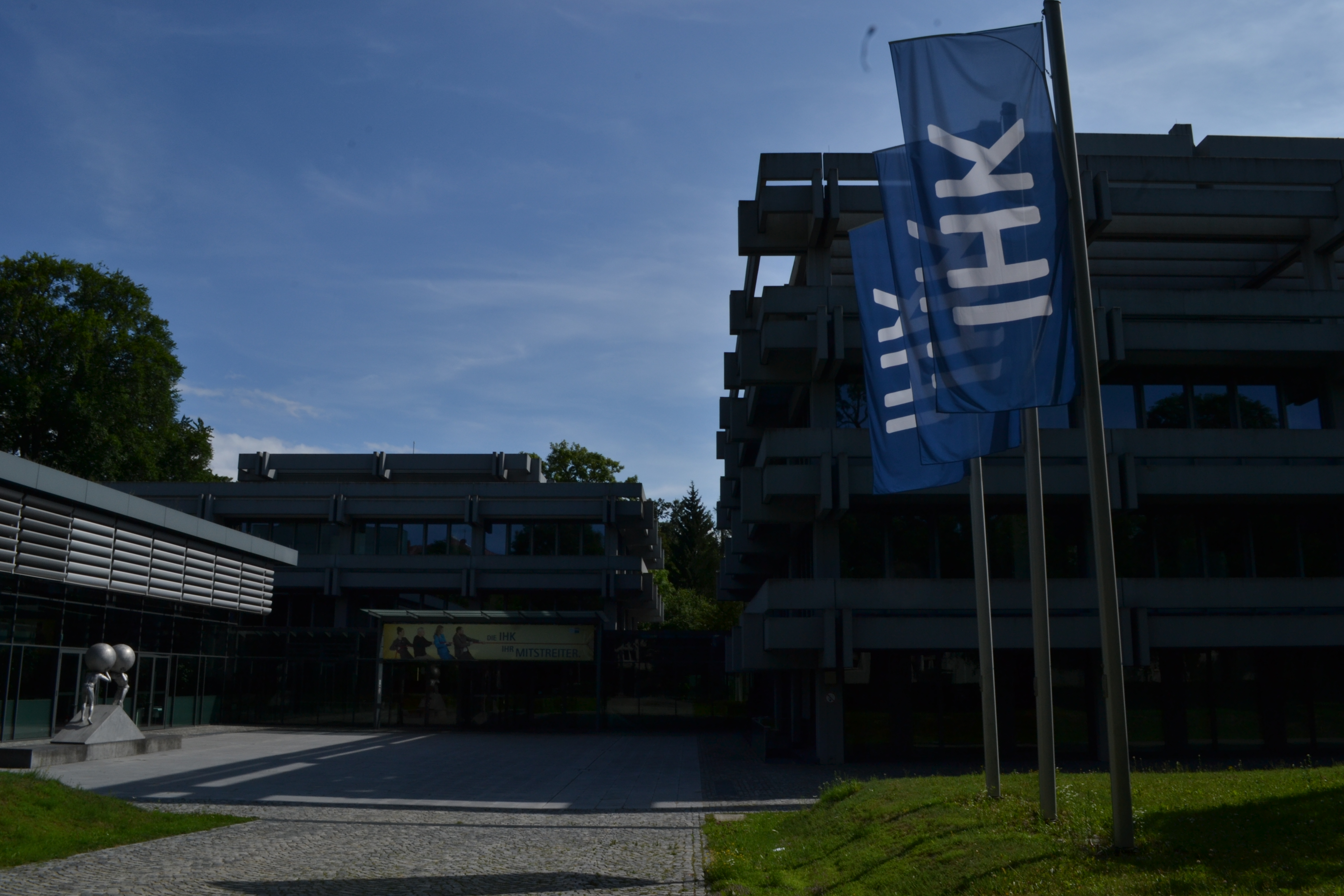 Hauptgebäude der Industrie- und Handelskammer Schwaben.